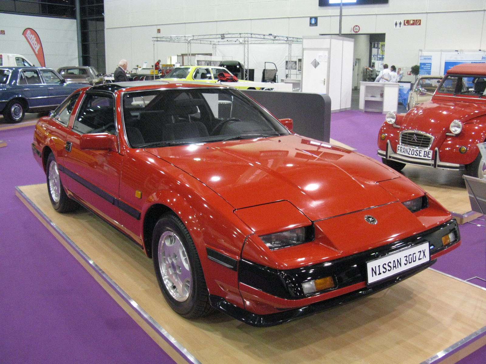 Nissan 300 ZX